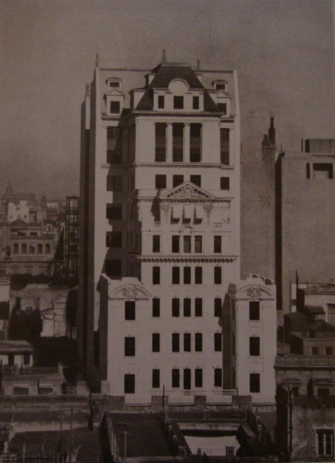 Edificio de la Compañía Unión Telefónica, donde se instalaron sus oficinas administrativas y una central telefónica. Hoy funciona allí Telefónica de Argentina. Calle Defensa nº 143.